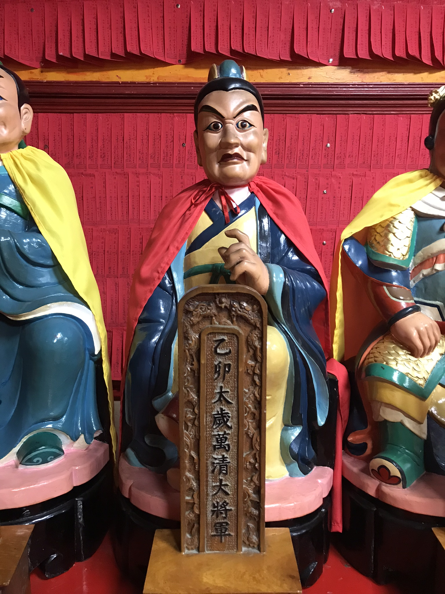 乙卯太歲萬清大將軍神像